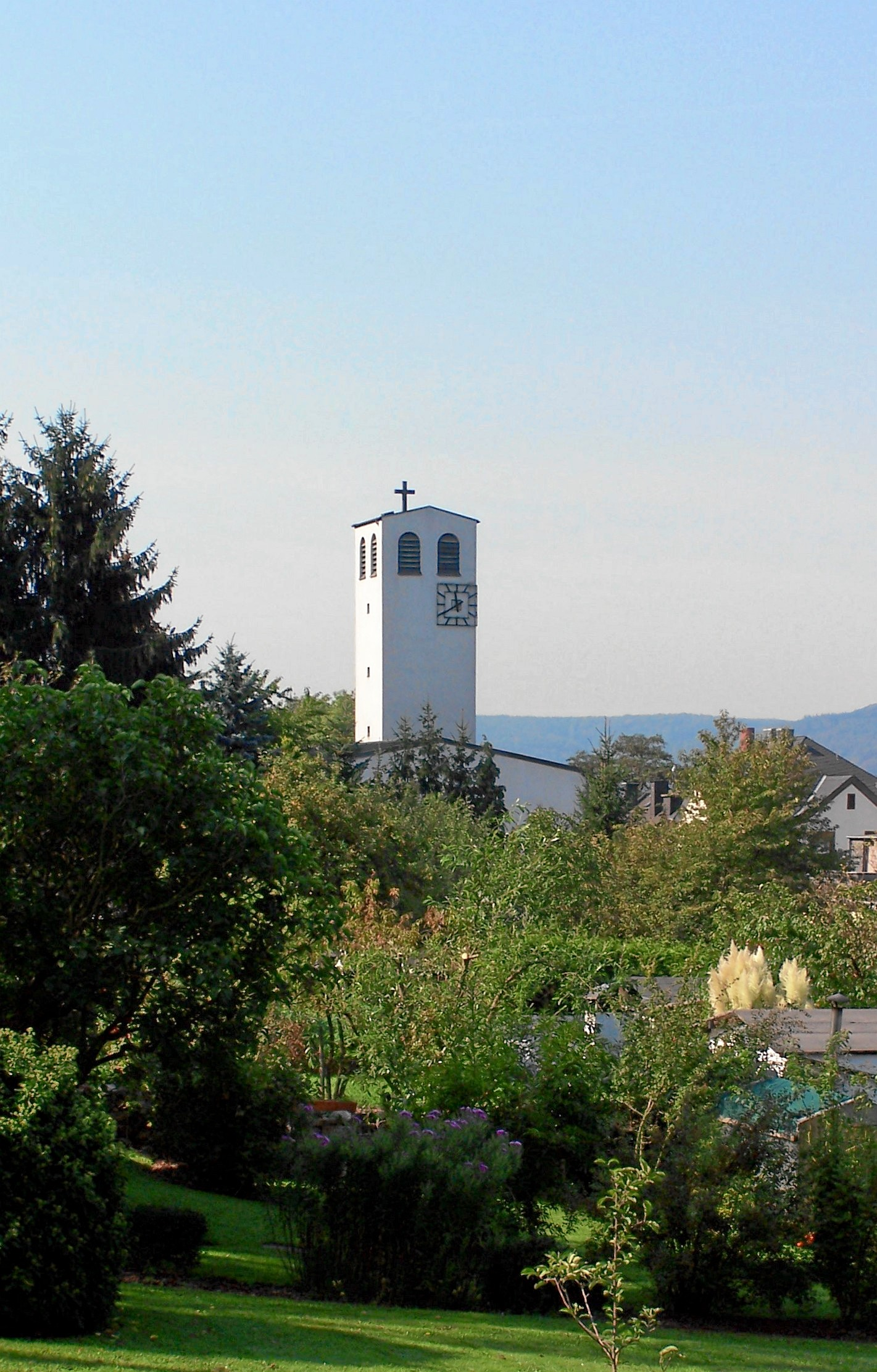 Trier Kürenz; Katholische Pfarrkirche St. Bonifatius vom Kobusweg aus betrachtet; zweischiffiger kubischer Bau in Formen der Neuen Sachlichkeit, kupfergedecktes Satteldach, 1932/33, Architekt F. Thoma; Ausstattung aus mehreren Epochen